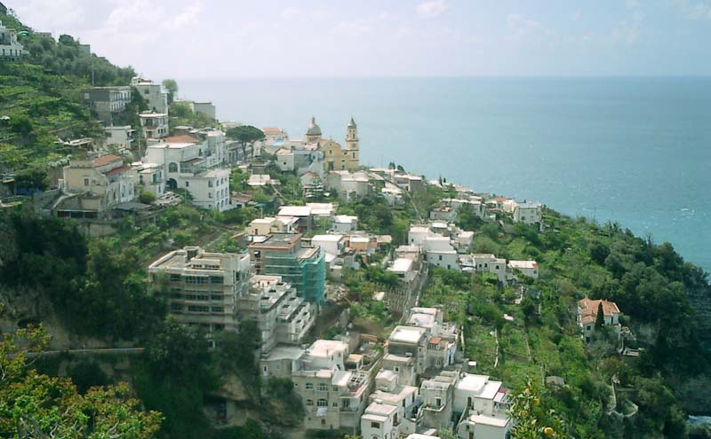 Praiano, Campania, Italia